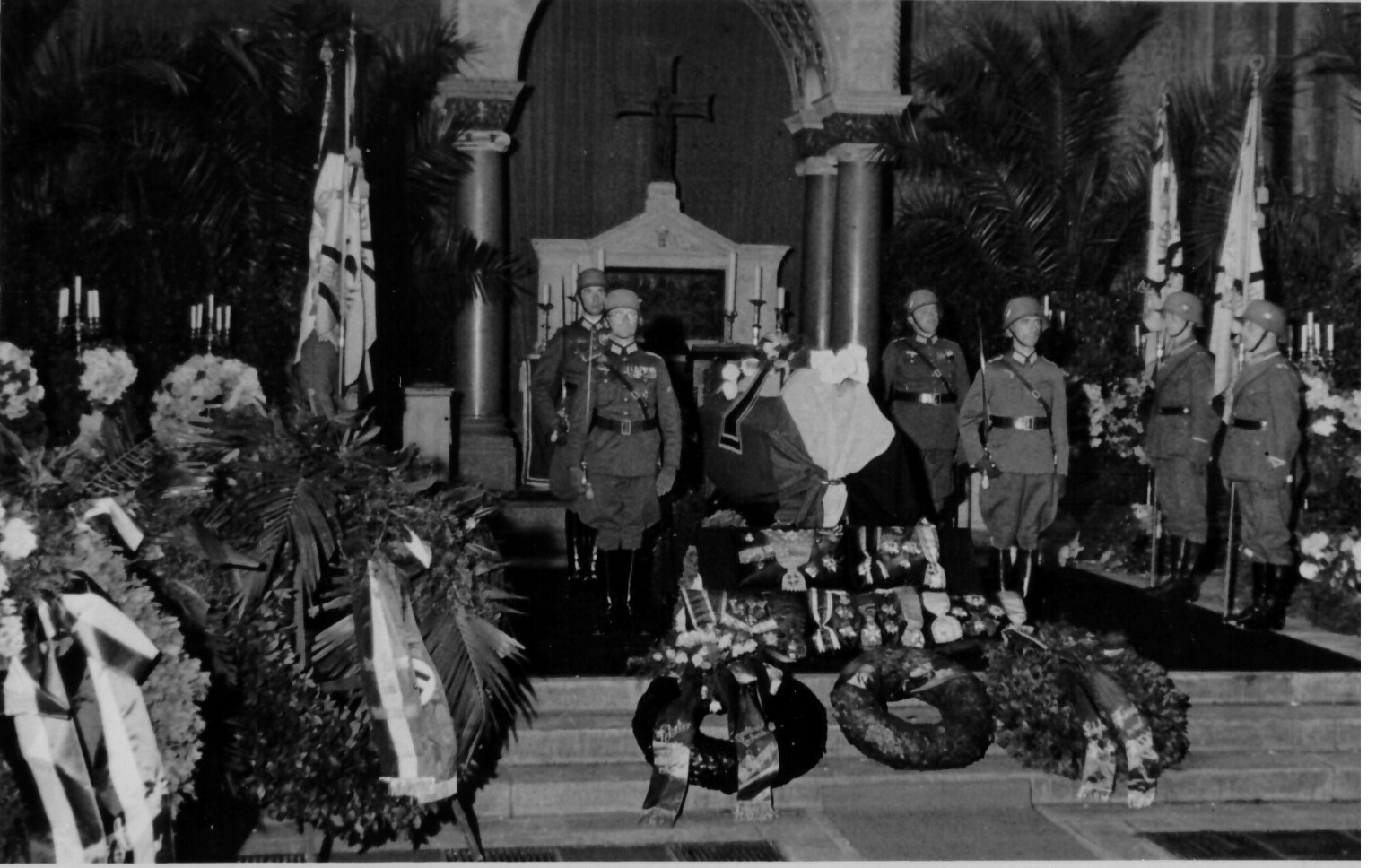 Staatsbegräbnis Alexander v. Linsingen 08.06.1935 in der Garnisonkirche Hannover